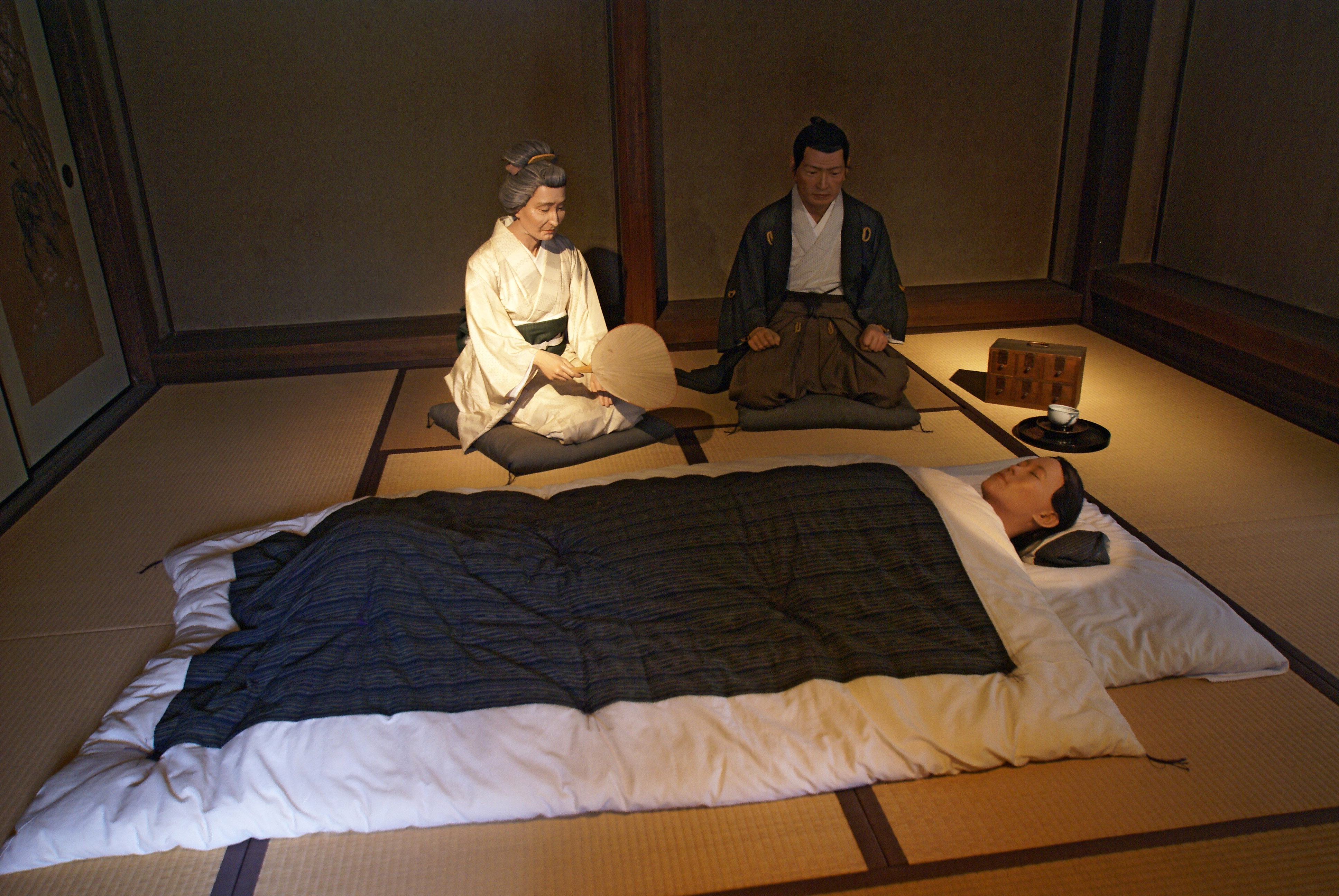 Shunrinken in Kinokawa, Wakayama prefecture, Japan